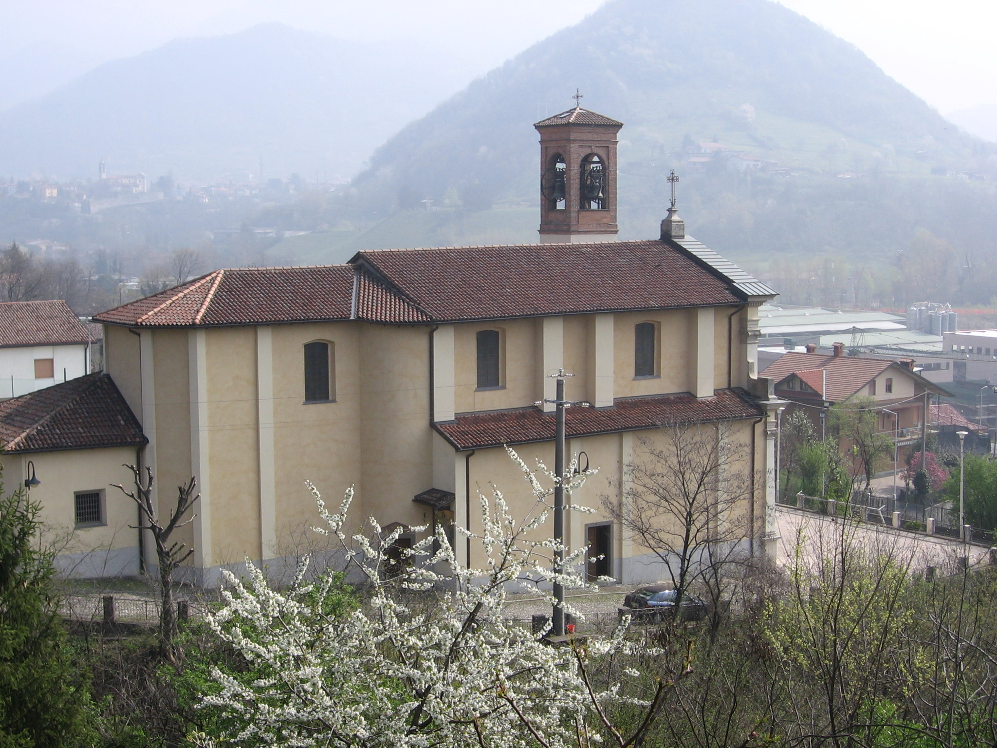 Luzzana, Bergamo, Italia